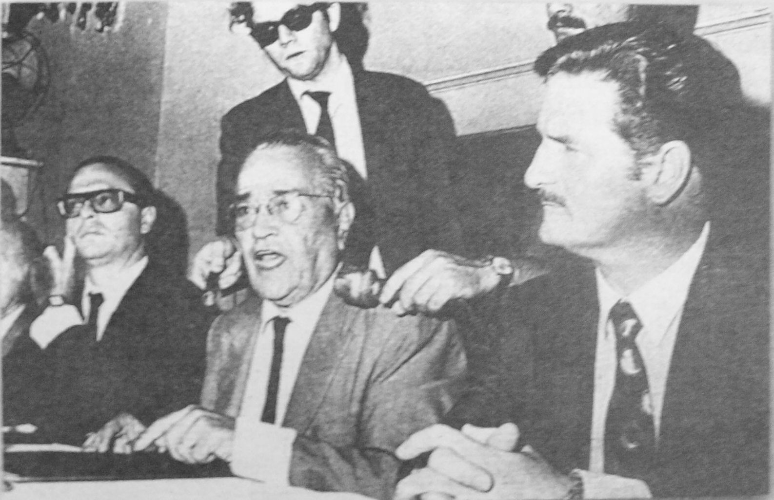 Foto del político radical Ricardo Balbín con el delegado peronista Daniel Paladino, en una reunión de La Hora del Pueblo.